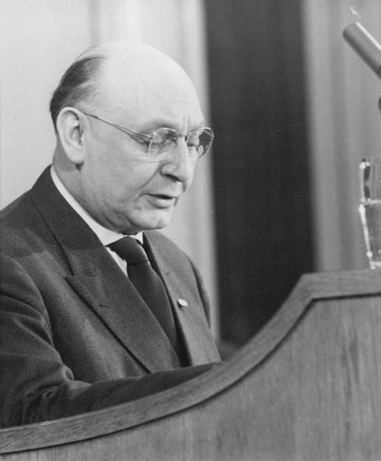 Zentralbild/Junge 28.3.1962 Volkskammer der DDR berät Volkswirtschaftsplan und Staatshaushaltsplan 1962 - Dr. Lothar Bolz gibt aussenpolitische Erklärung ab Die Volkskammer der Deutschen Demokratischen Republik trat am 28.3.1962 zu ihrer 22. Sitzung zusammen. Zu Beginn gab der Minister für Auswärtige Angelegenheiten, Dr. Lothar Bolz, eine Erklärung zu aussenpolitischen Fragen ab. Im Mittelpunkt der Volkskammersitzung stehen die erste und zweite Lesung des Beschlusses der Volkskammer über den Volkswirtschaftsplan 1962 und des Gesetztes über den Staatshaushaltsplan 1962. UBz.: Der Minister für Finanzen, Willi Rumpf, begründet den Beschluß über den Staatshaushaltsplan 1962.